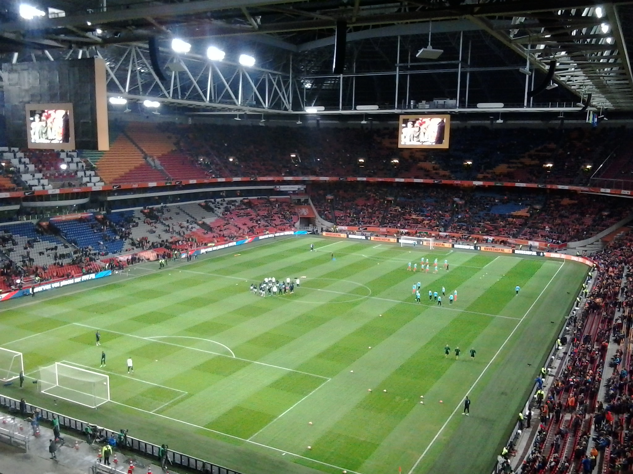 Photo taken at friendly match Netherland - France (2:3)